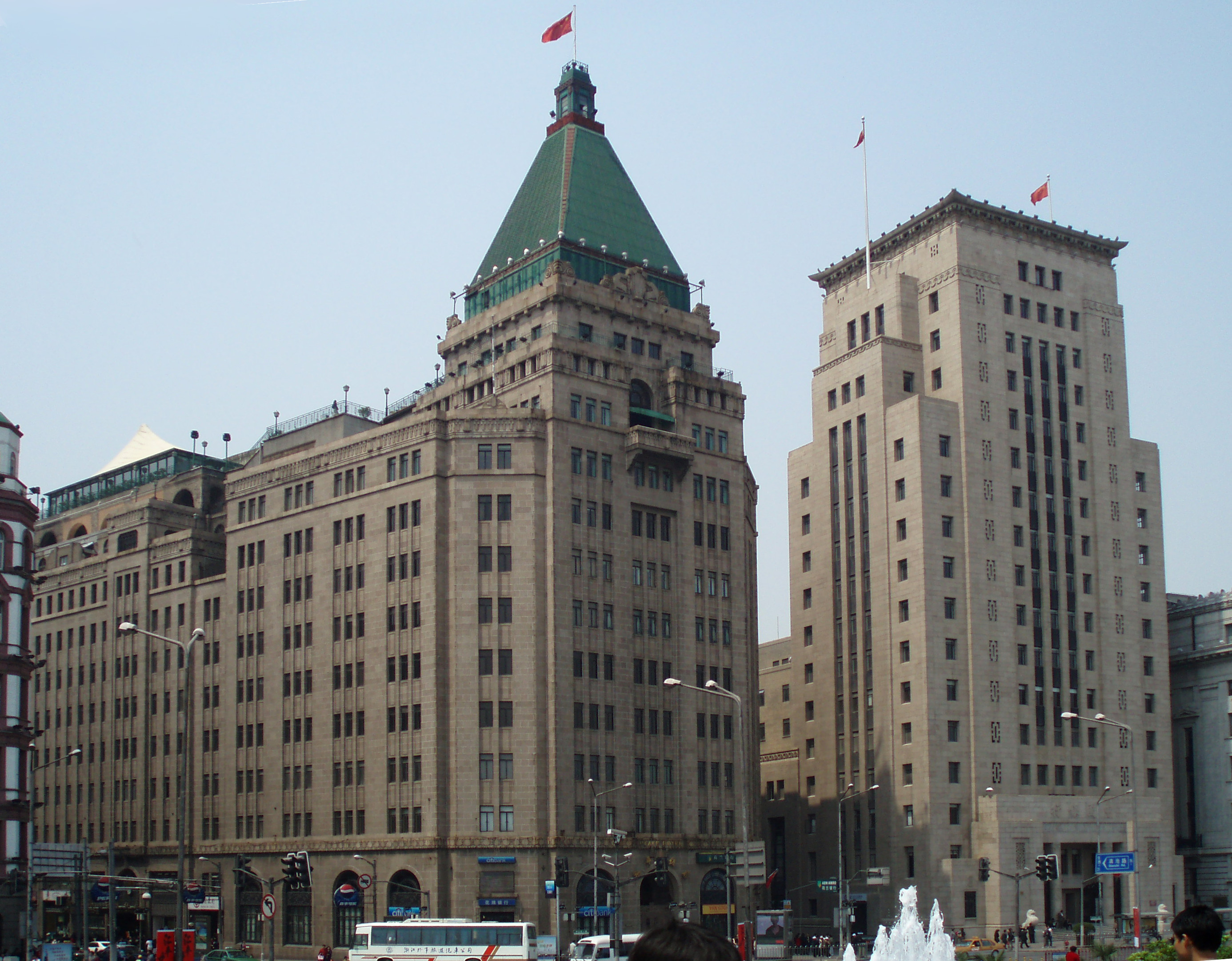 Palace Hotel, Peace Hotel et édifice de la Bank of China sur le Bund de Shanghai